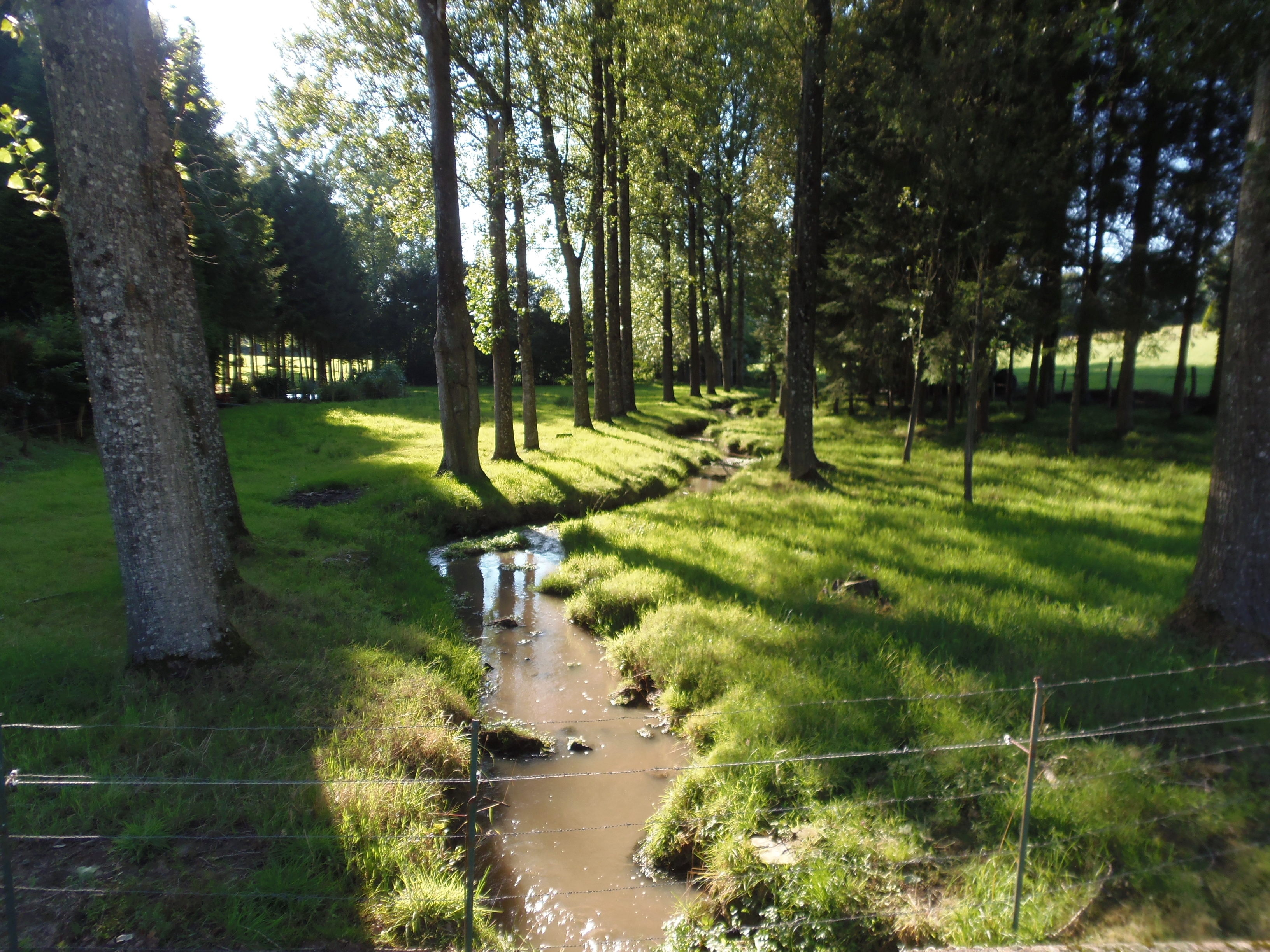 Sourdeval (Normandie, France). La Sée Rousse à l'Aubesnière.